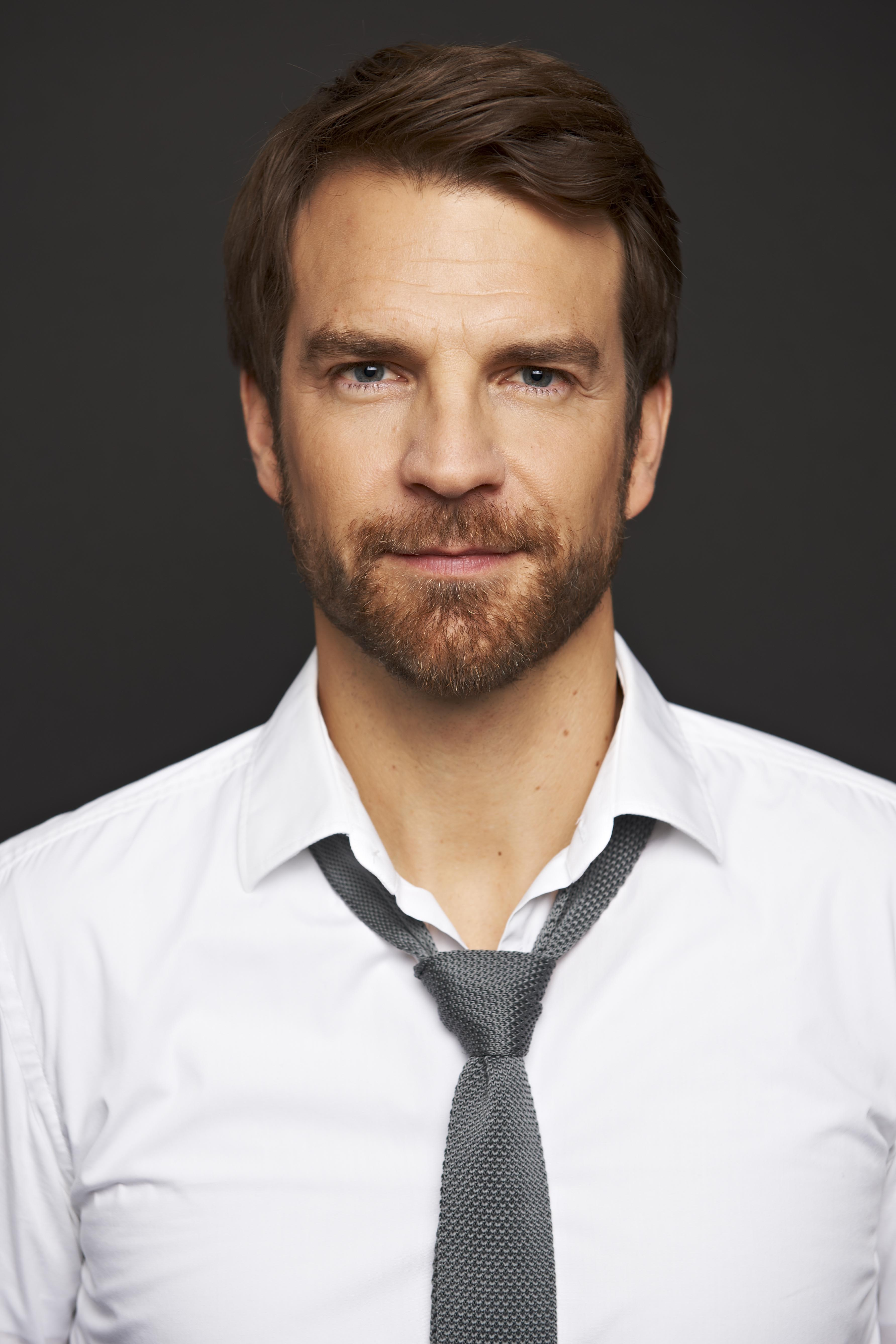 Porträt / Fotograf Gunnar Nicolaus